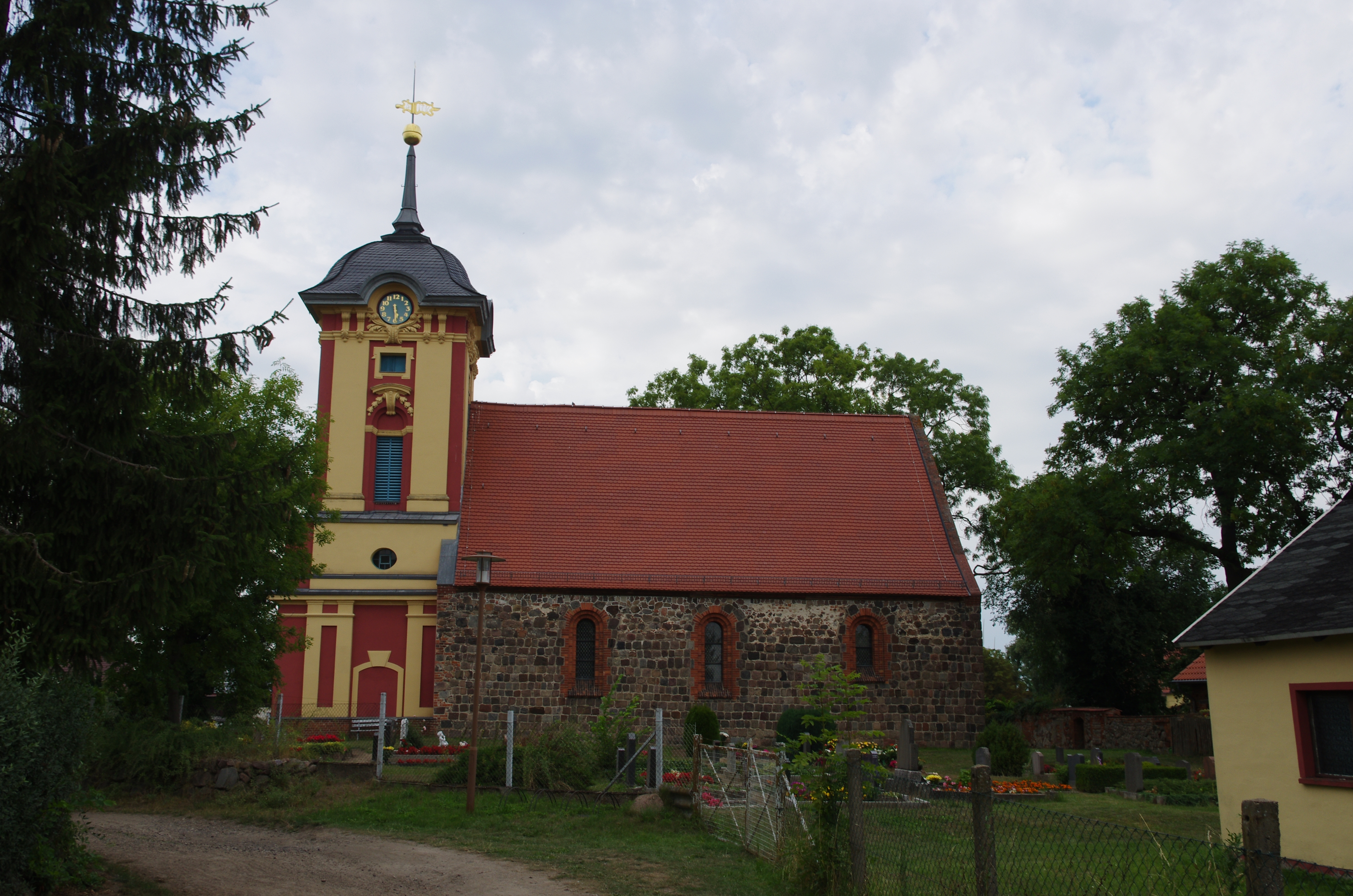 Wriezen in Brandenburg. Die Kirche in Frankenfelde steht unter Denkmalschutz.